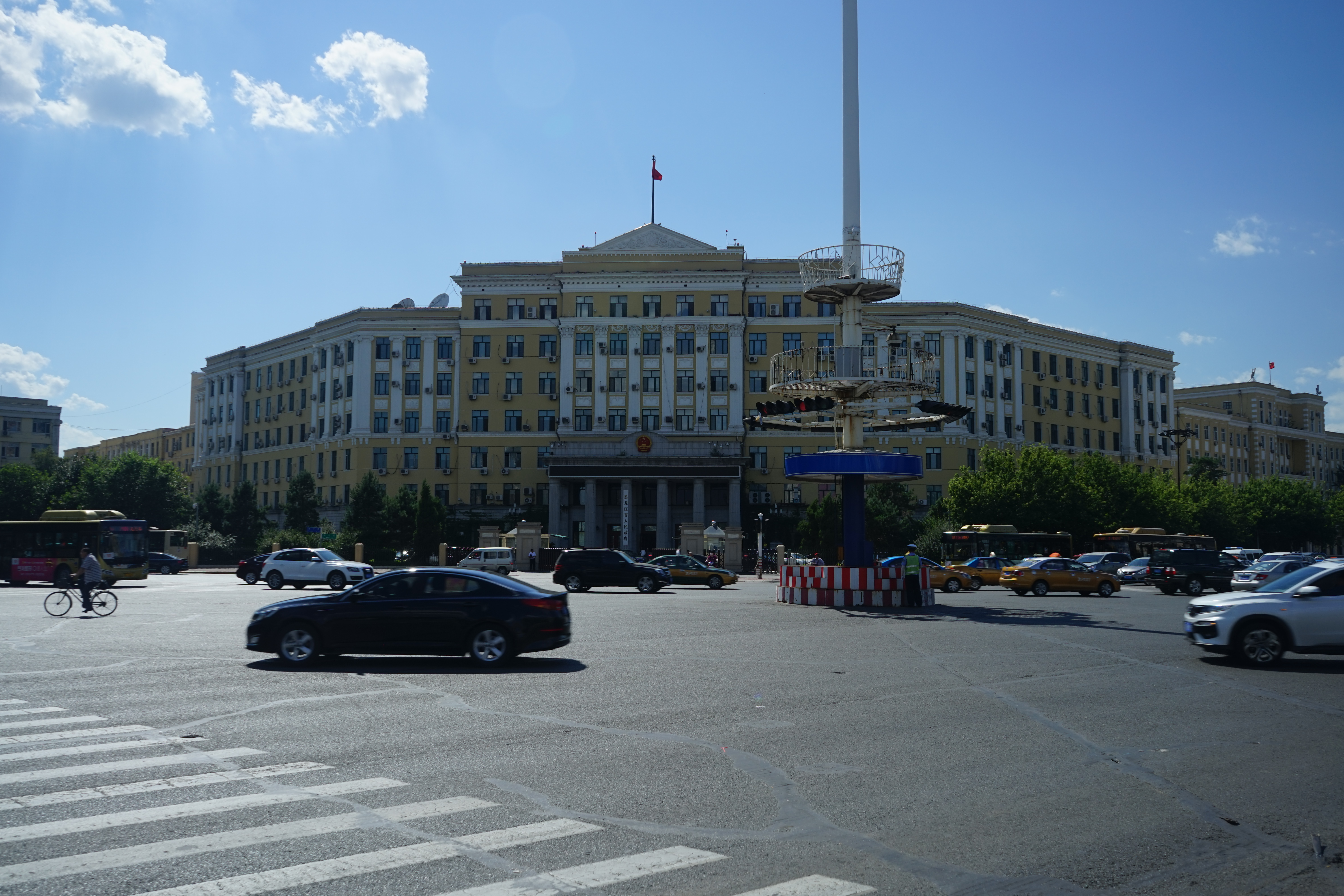 黑龙江省人民政府大楼